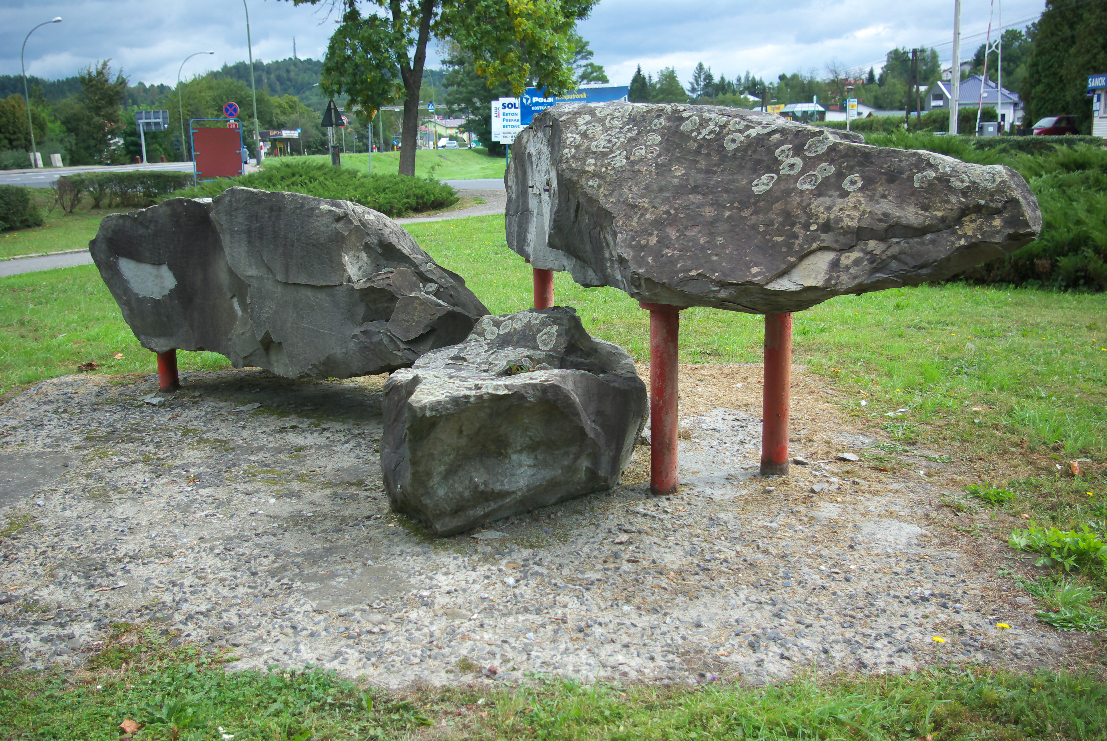 Pomnik poległych funkcjonariuszy Powiatowego Urzędu Bezpieczeństwa Publicznego w Sanoku przy ulicy Krakowskiej